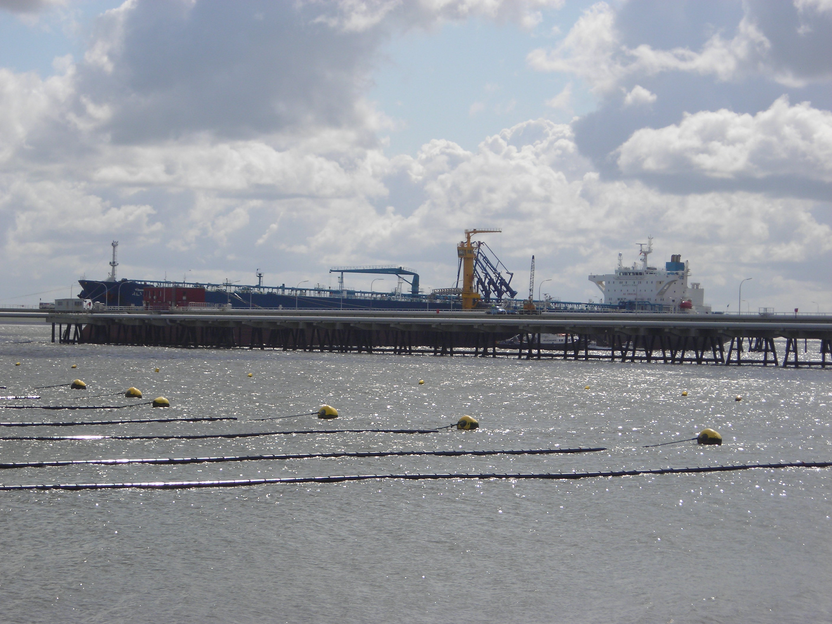 Die Tankerlöschbrücke der NWO-Ölleitungsgesellschaft in Wilhelmshaven. Daran der Tanker Alyarmouk (116.000 tdw) beim Löschen von 80.000 t Erdöl (Zeitungsmeldung). Im Vordergrund bereitliegende Ölbarrieren. Tanker pier of the NWO pipeline company at Wilhelmshaven. The tanker Alyarmouk (116,000 tdw) is berthed to unload 80,000 t crude oil (newspaper report). In the foreground ready to use oil barriers